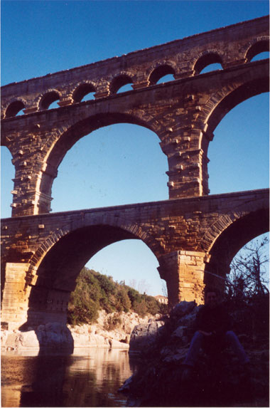 Pont du Gard Copyright: Meine eigene Photographie (Michael.chlistalla). Lizenz: GNU FDL